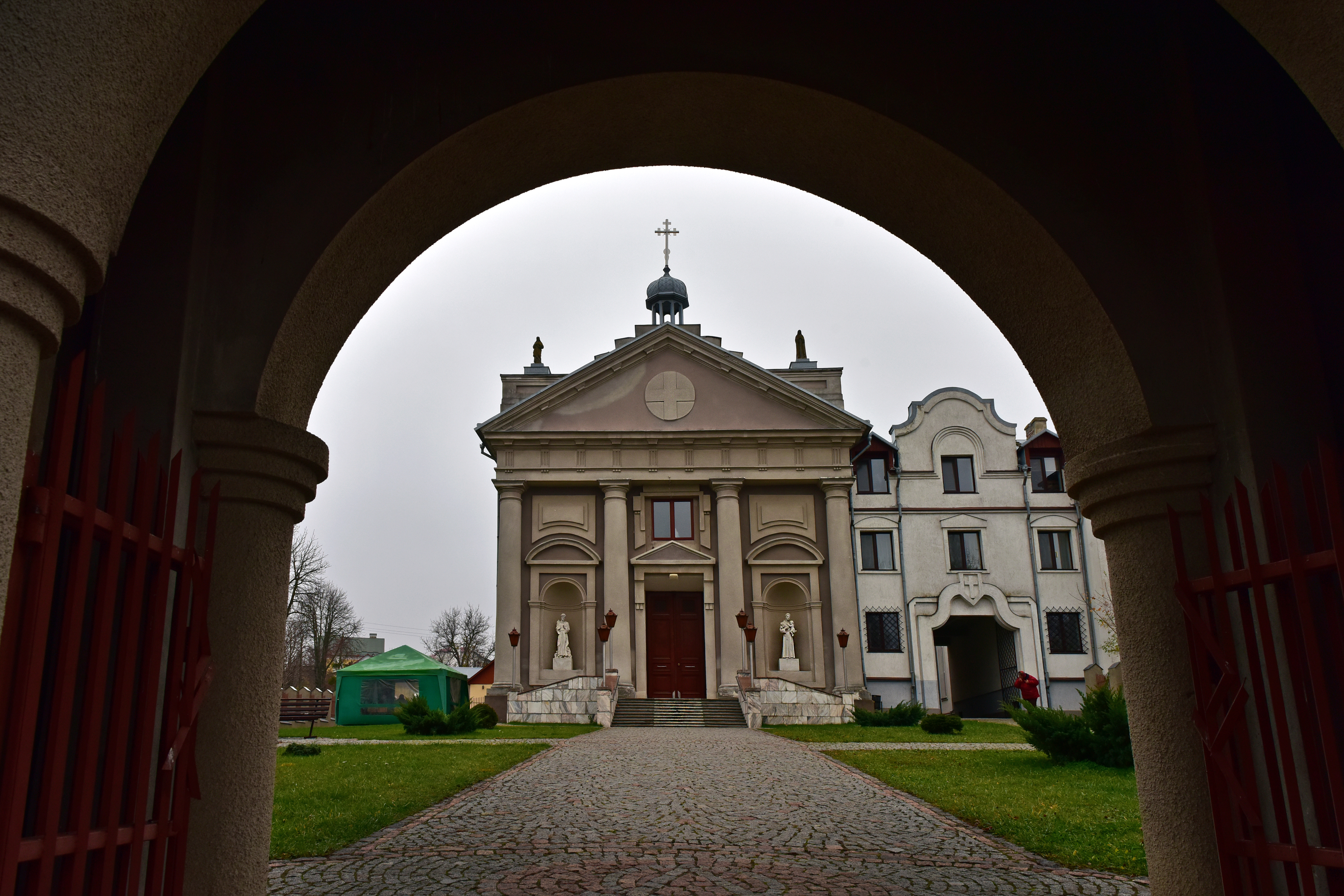 Костьол Серця Ісуса, Красилів, вул. Центральна